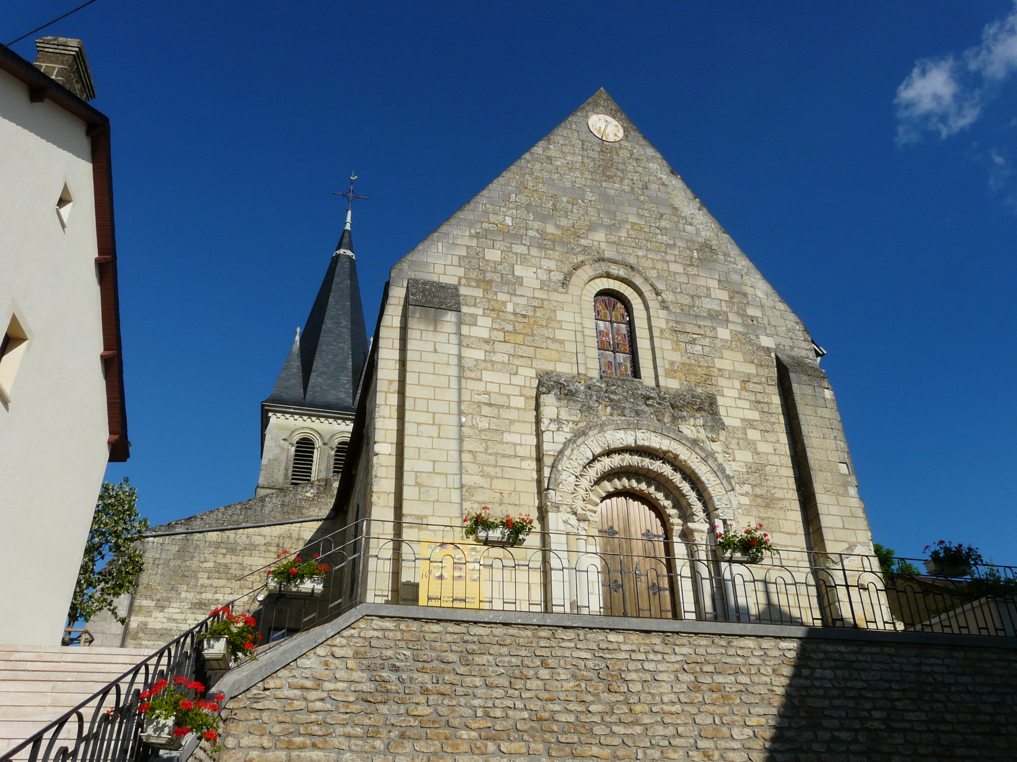 L'église Saint-Léger, Saint-Léger-de-Montbrillais, Vienne, France